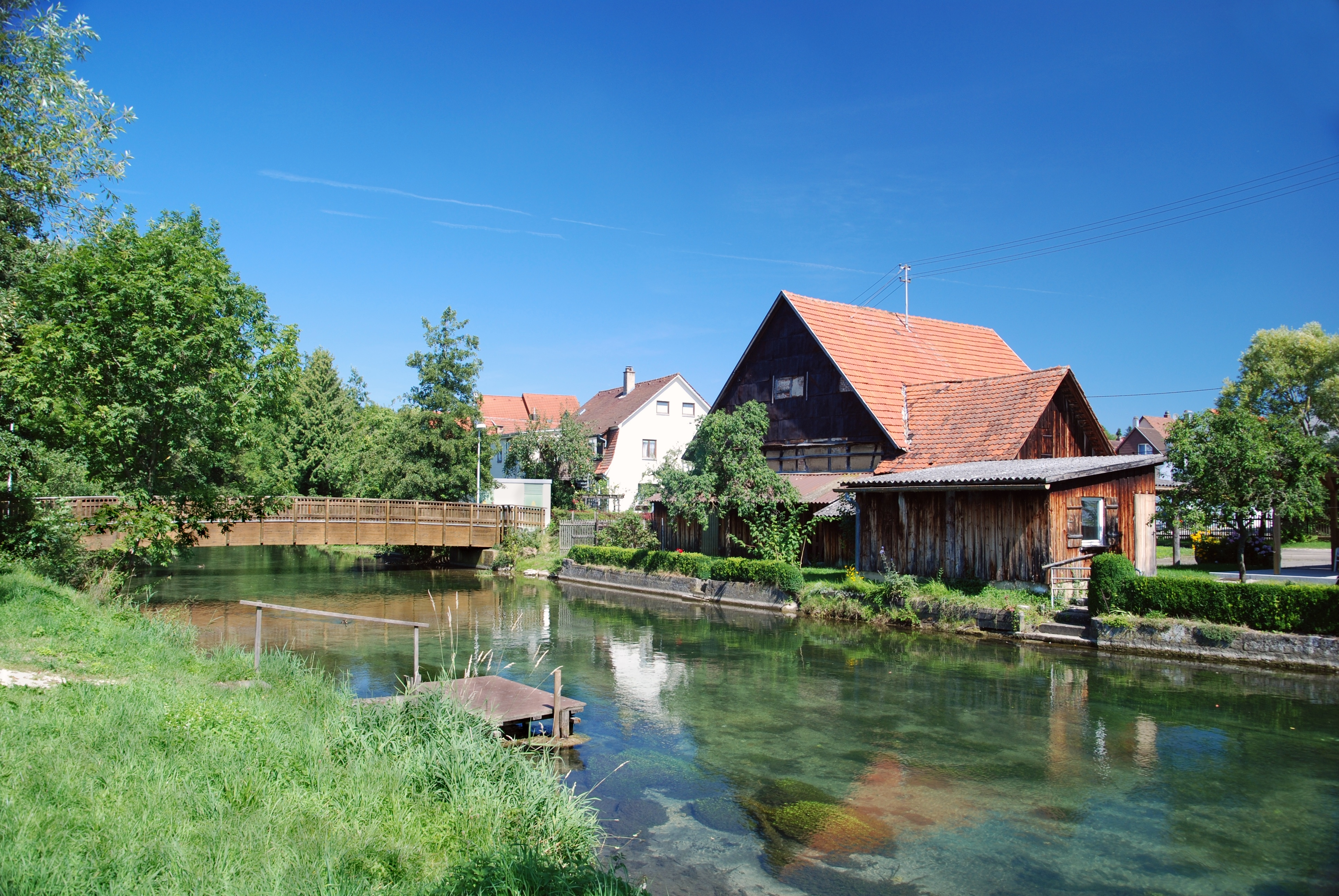 Fluss Brenz in Herbrechtingen, Schwäbische Alb.